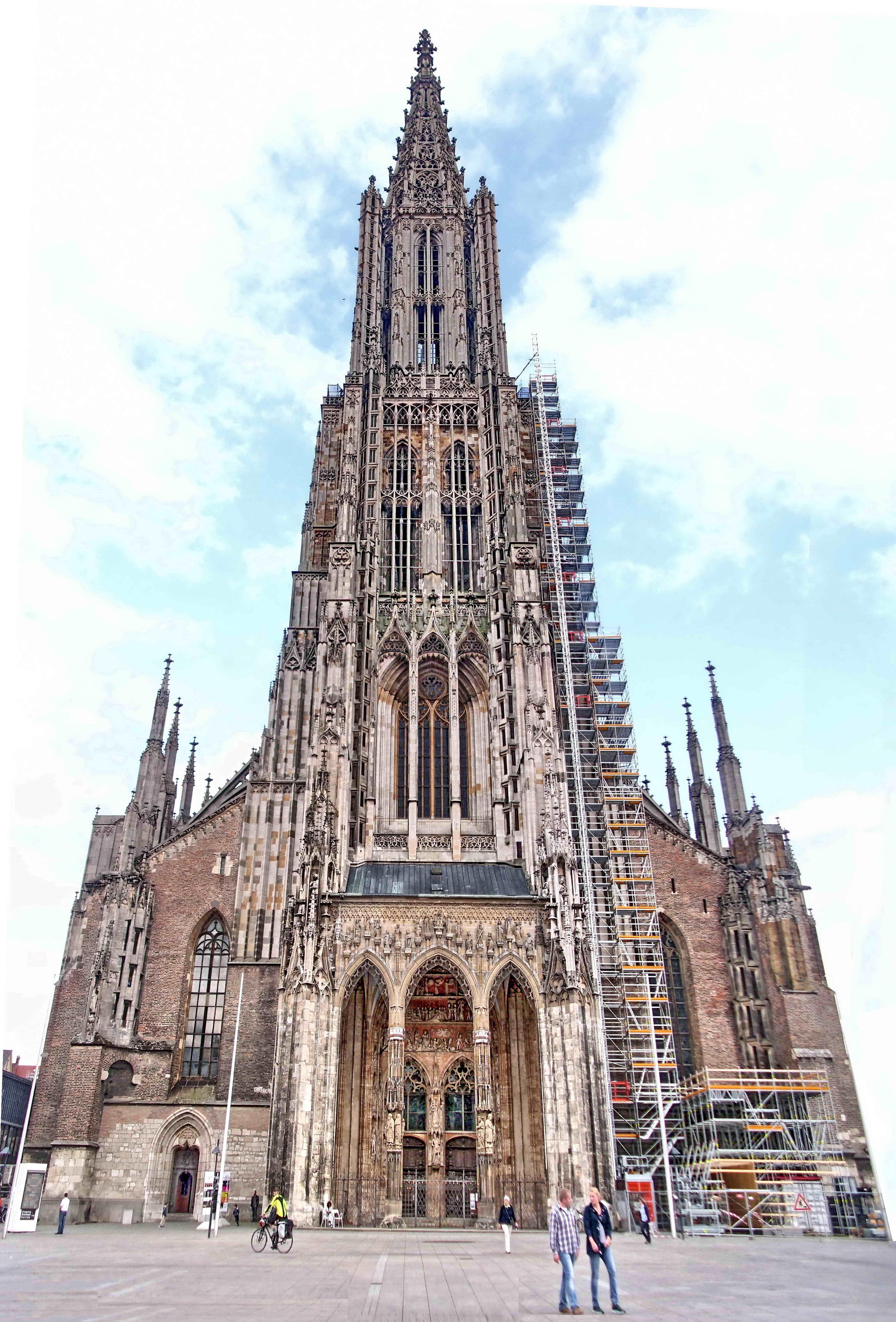 Der höchste Kirchturm der Welt!